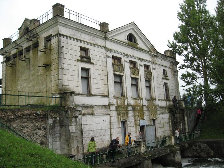 Дрысвяты. ГЭС Дружбы народаў